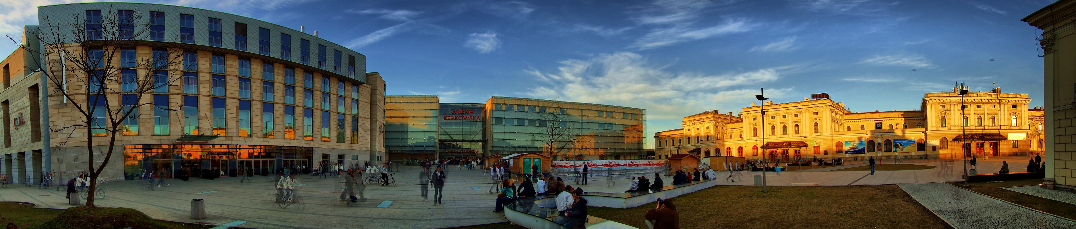 Galeria Krakowska - widok od wejścia głównego, po prawej dworzec